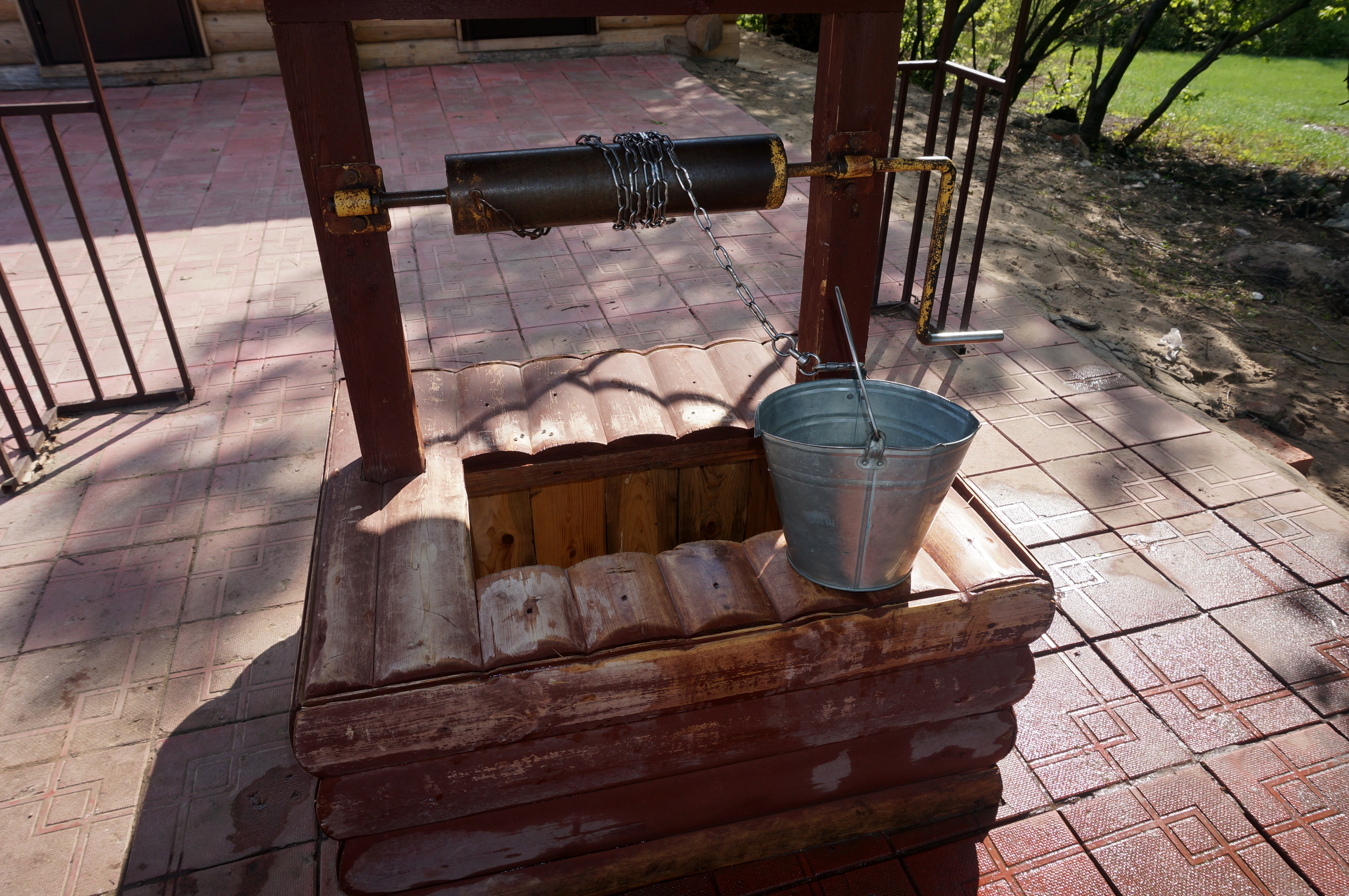 Родник в окрестностях с. Чубовка, Кинельский район Самарской области This image is related to the protected area of Russia number 6310840